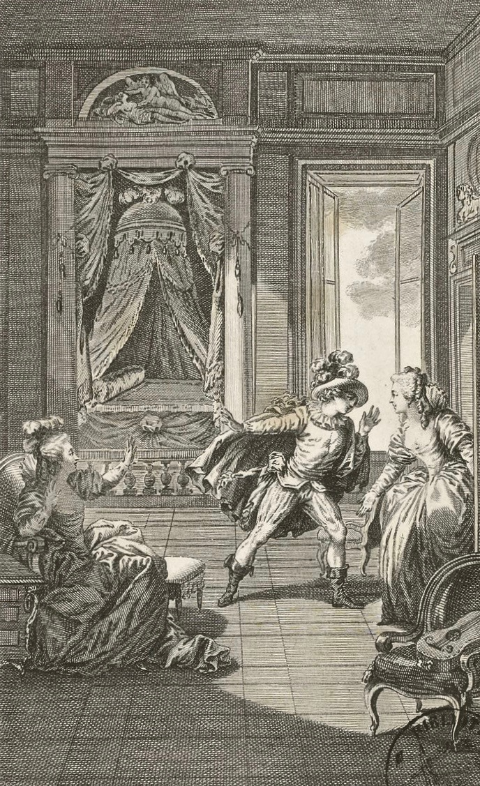 Claude-Nicolas Malapeau (1755-1803) nach Jacques-Philippe-Joseph de Saint-Quentin (* 1738): Illustration zum 2. Akt in der Erstausgabe von "Le mariage de Figaro" von Pierre-Augustin Caron de Beaumarchais (1732–1799), Ruault, Paris 1785. Bibliothèque nationale de France.